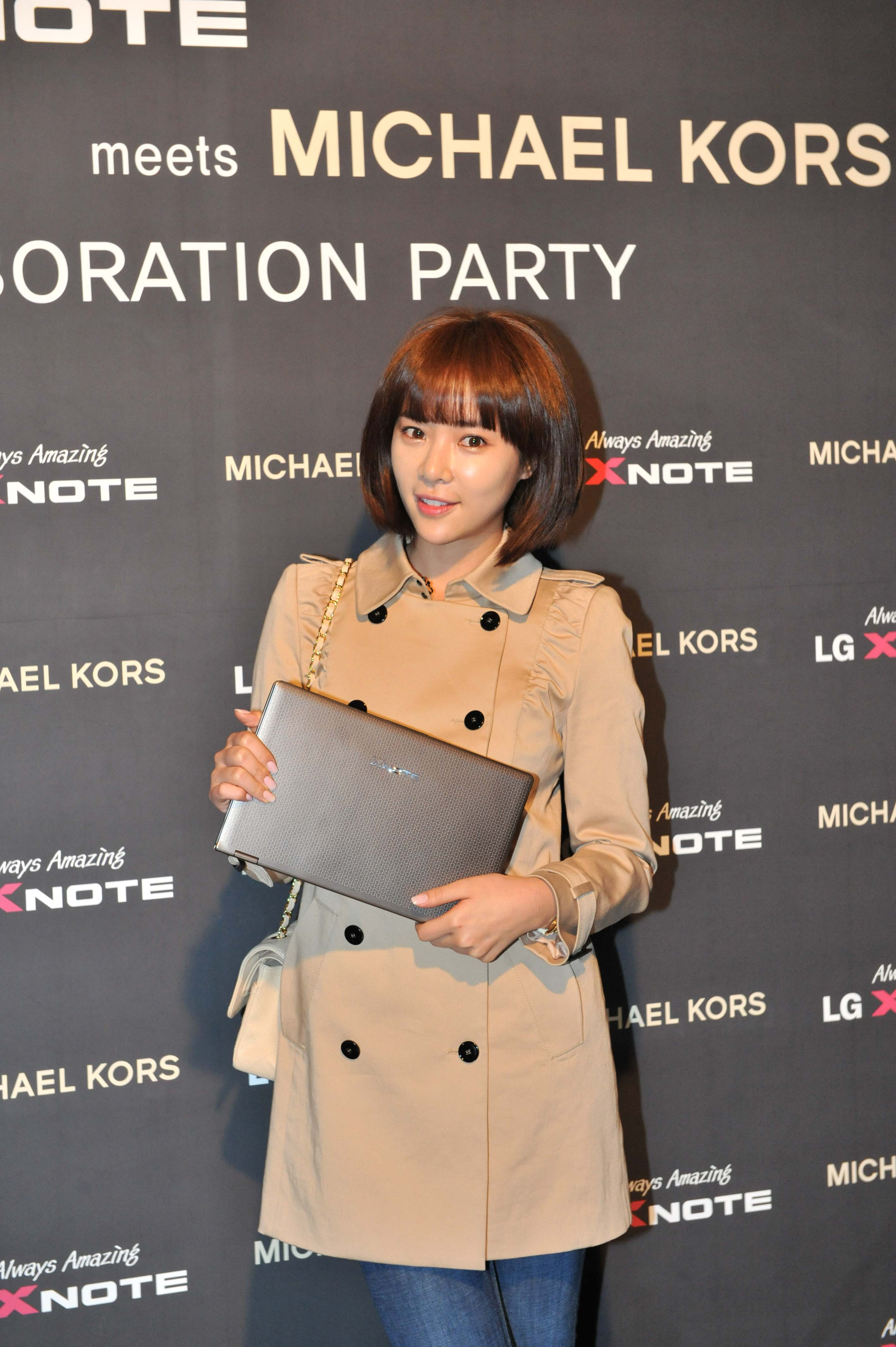 '엑스노트 마이클 코어스 에디션' 런칭 행사는 스타일링 클래서, 영상쇼, 패션쇼 등 다채로운 프로그램이 마련됐으며, 특히 황정음, 김하늘, 박한별 등 정상급 연예인과 장윤주, 송경아, 한혜진 등 탑 모델들이 대거 참석해 이목을 집중시켰다.